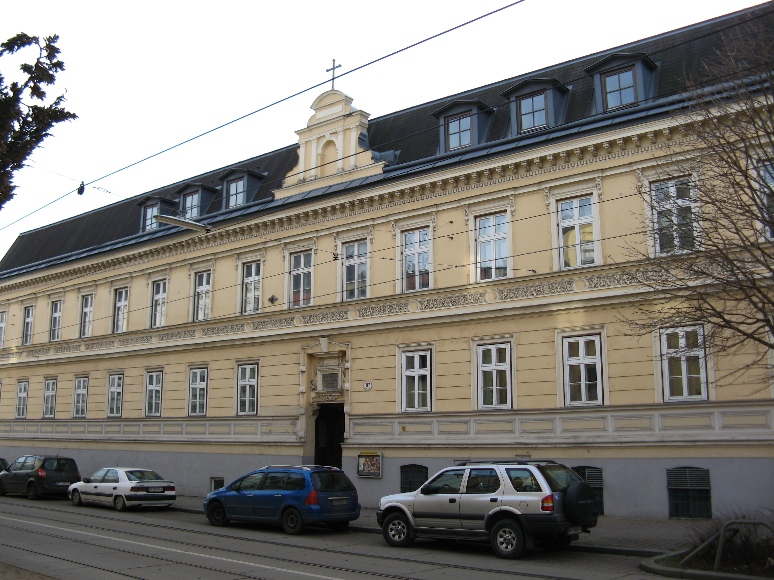 Marianneum (1886-88) von Ludwig Zatzka in Wien-Meidling